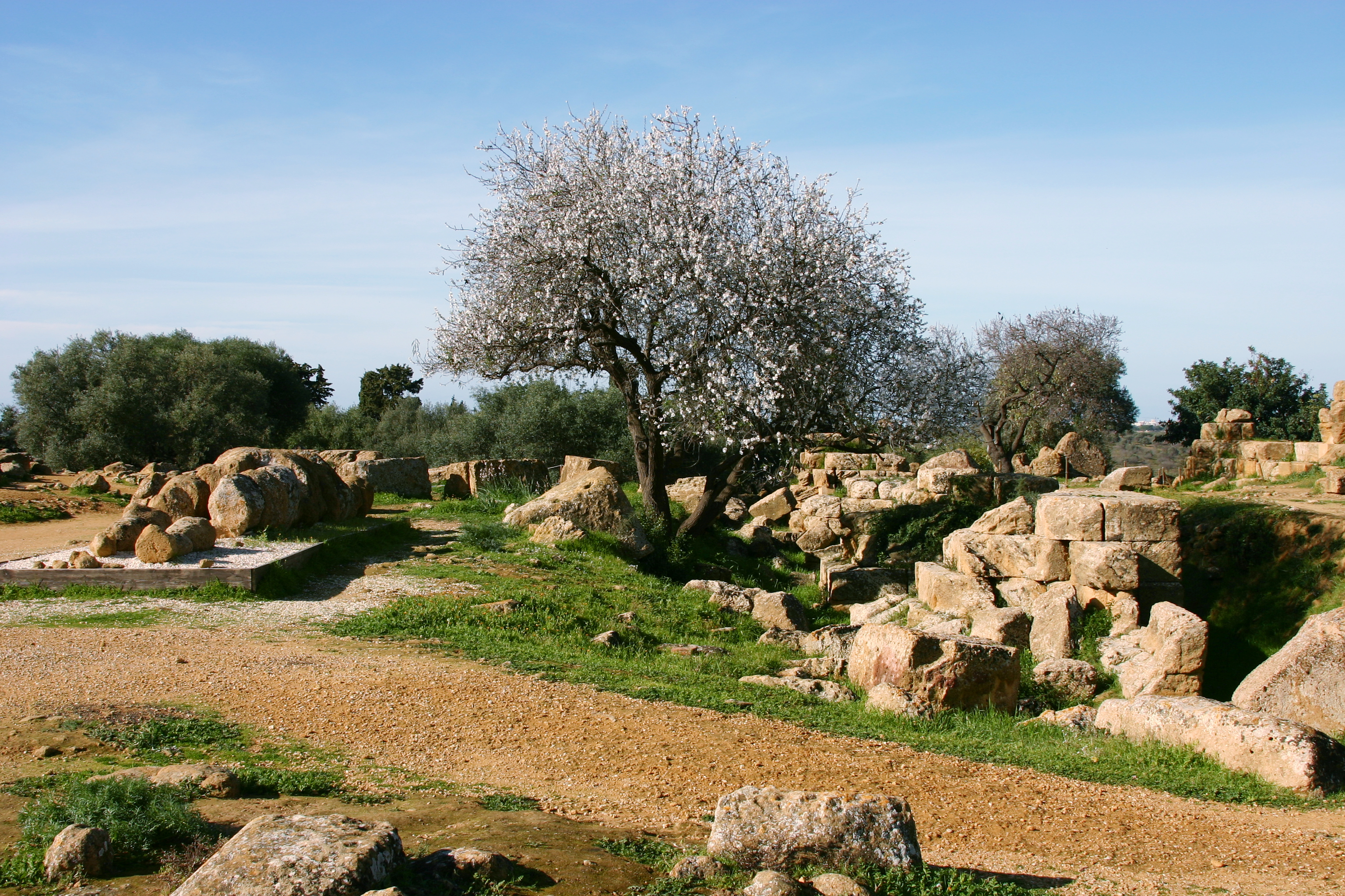 Temple of Zeus - Valle dei Templi